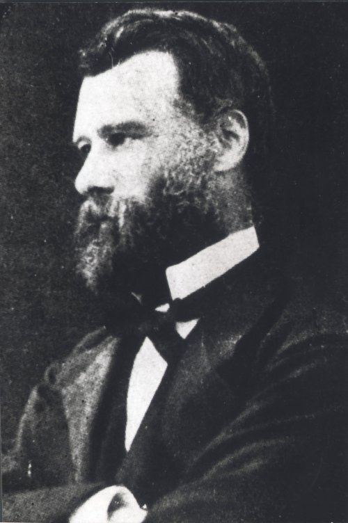 Enrique Cood Ross (Valparaíso, 1826 — Santiago, 27 de febrero de 1888) era una figura política de Chile, que sirvió como ministro y diplomático, durante el siglo XIX. Agente plenipotenciario chileno para enfrentar los reclamos de extranjeros por acciones del Ejército chileno durante la Guerra del Pacífico